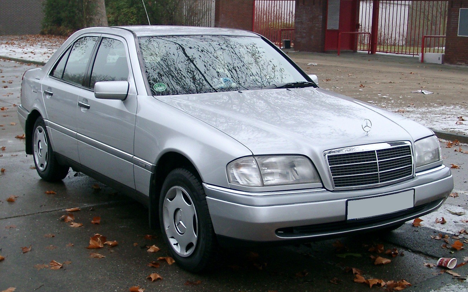 Mercedes-Benz W202